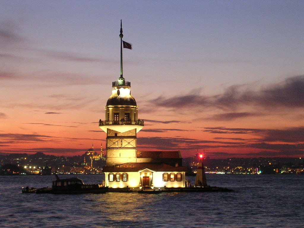 Maiden Tower (Kız Kulesi)